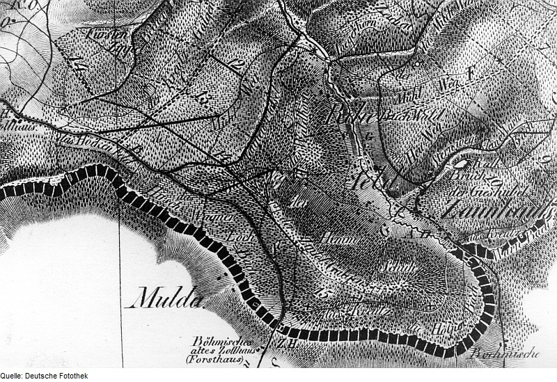 Original image description from the Deutsche Fotothek Altenberg-Rehefeld-Zaunhaus. Oberreit, Sect. Altenberg, 1821